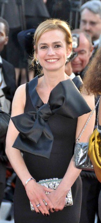 Sandrine Bonnaire au festival de Cannes